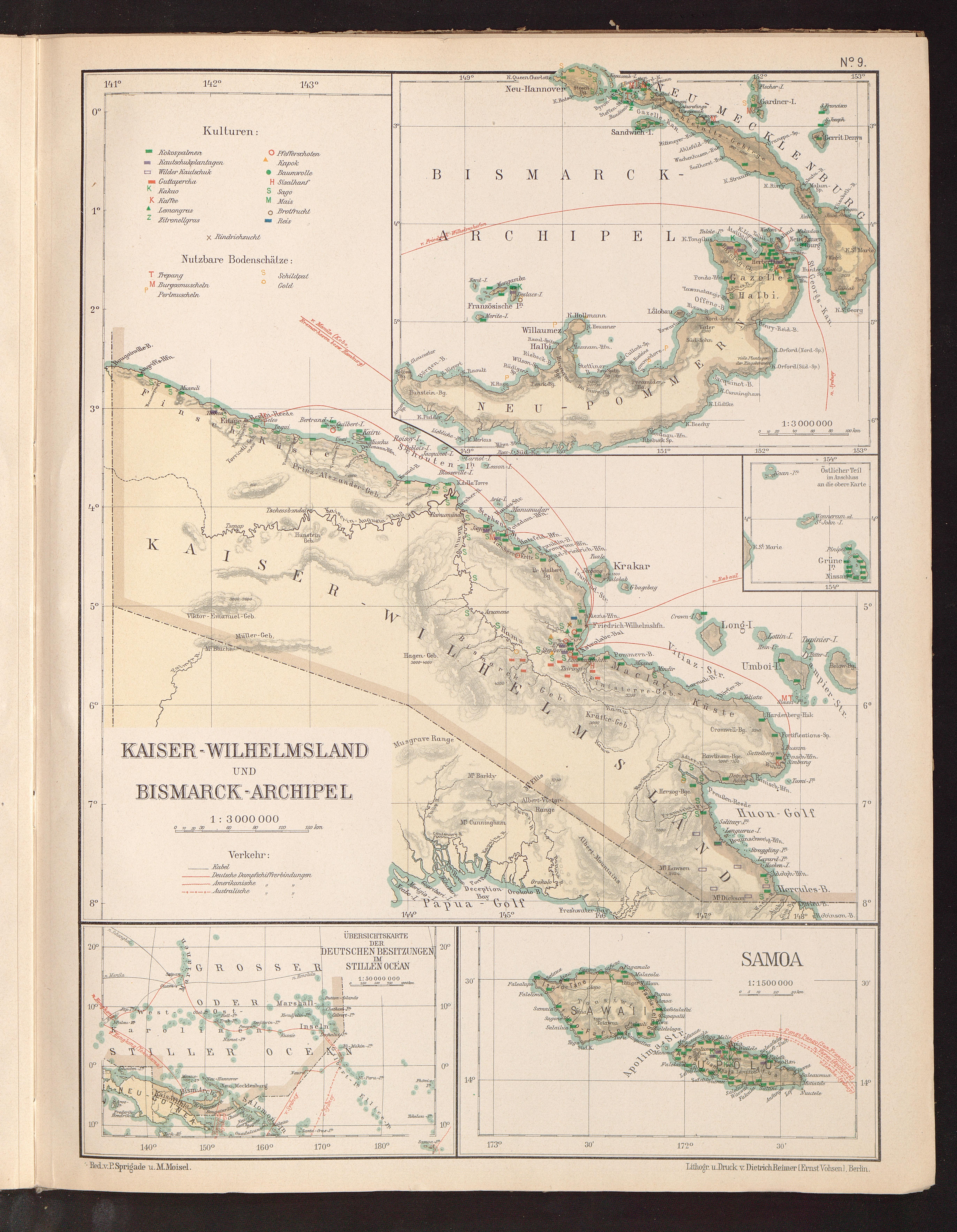 Wirtschaftsatlas der Deutschen Kolonien